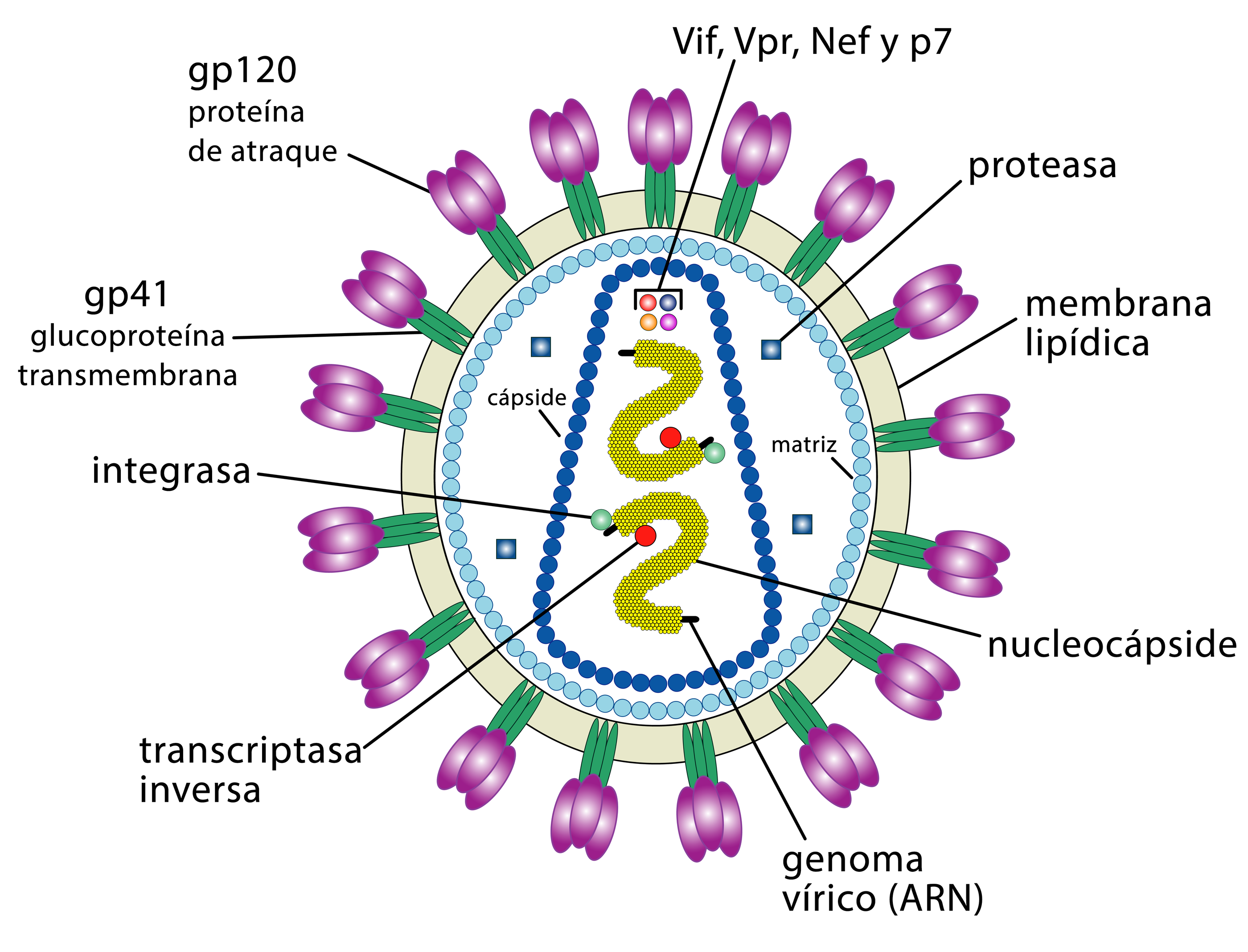 Modificado y rotulado a partir de: NIAID.